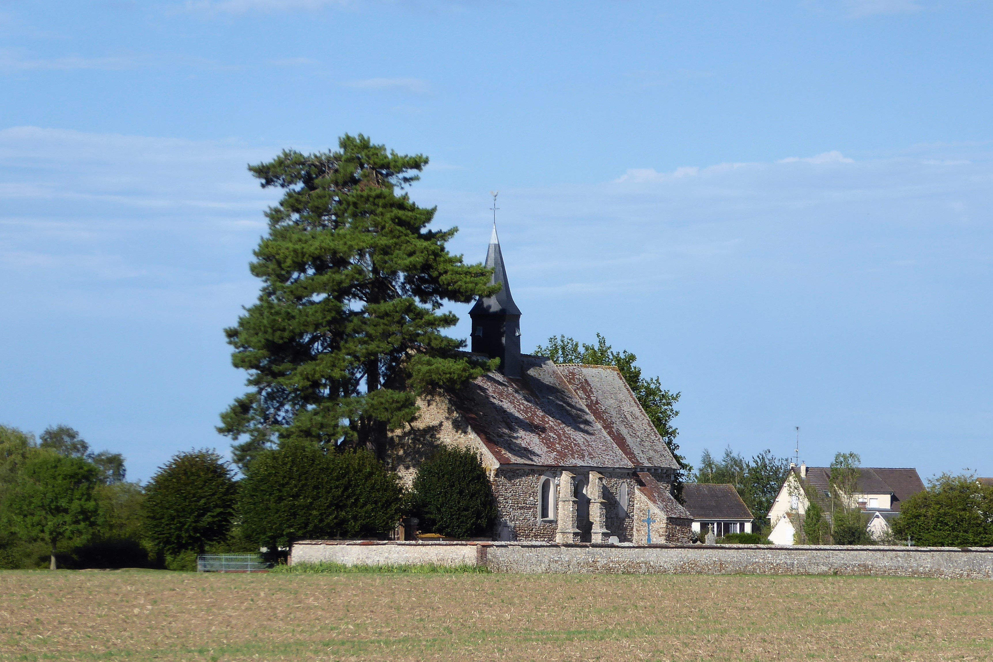 église Saint-Just-et-Sainte-Anne, Fresnay-le-Gilmert, Eure-et-Loir, France.